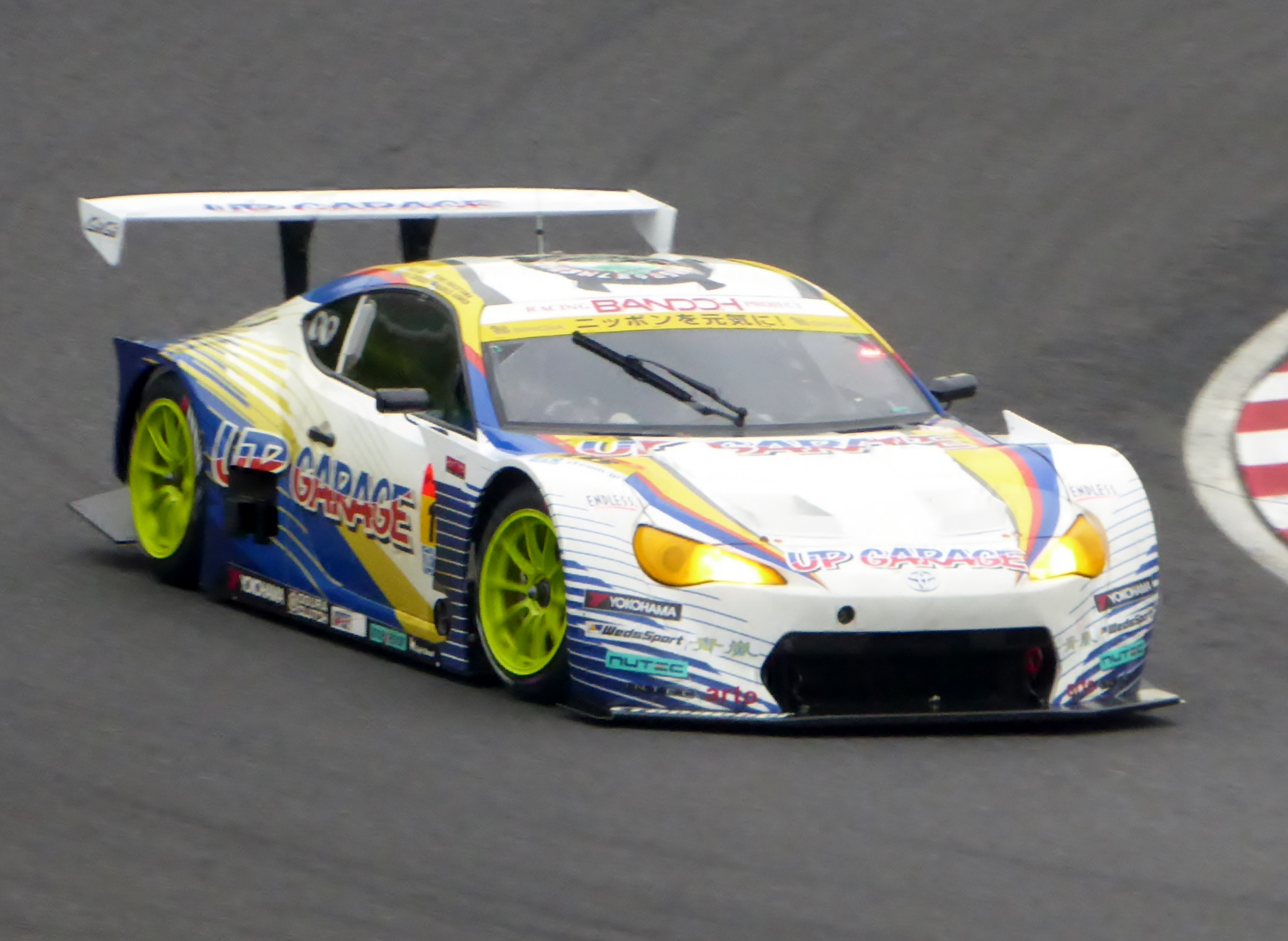 2015年鈴鹿1000㎞において18号車UPGARAGE BANDOH 86を撮影。